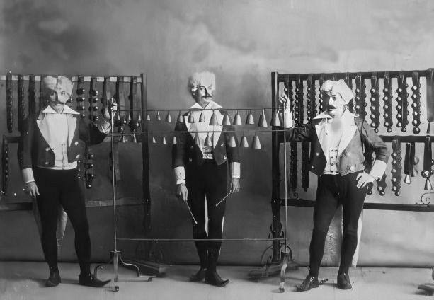 Grupo español de música, activo entre 1874 y 1899. Actuaban con instrumentos informales, interpretando fragmentos de música clásica y popular.